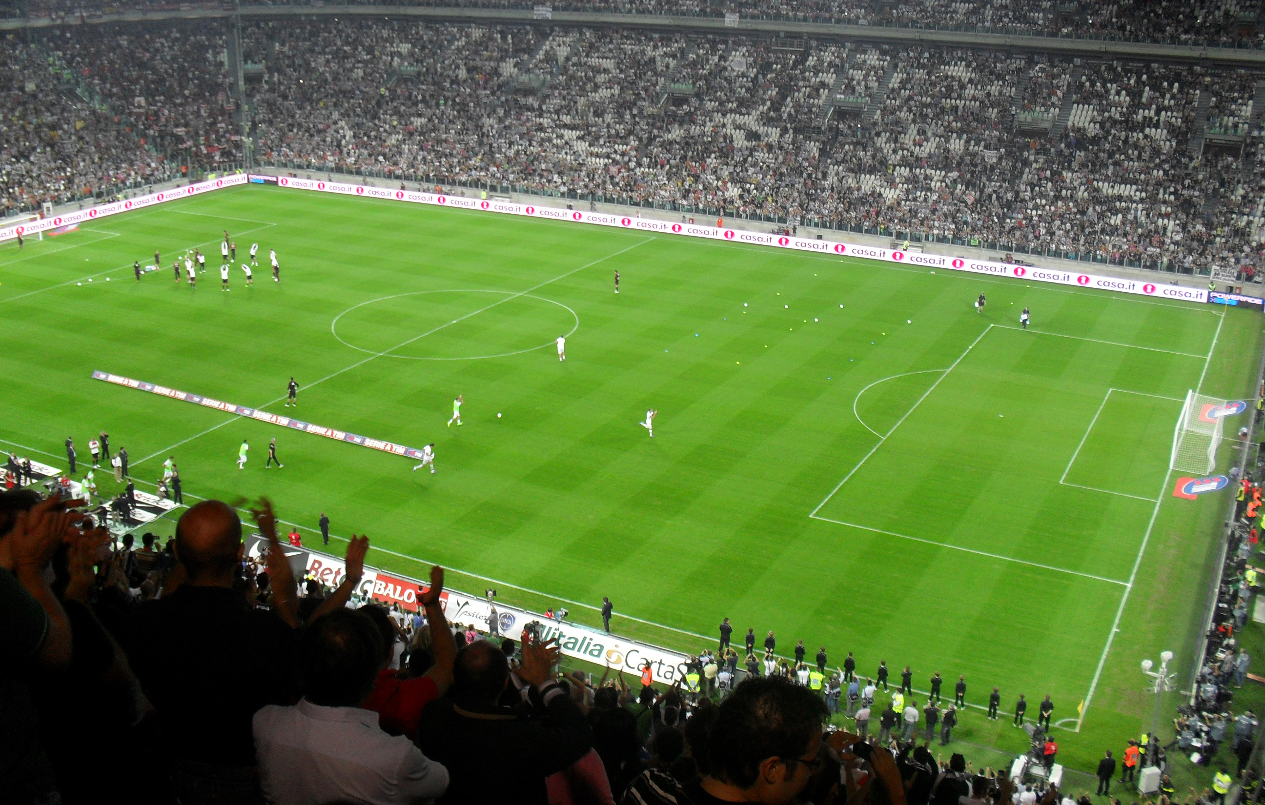 Veduta interna dello Juventus Stadium dalla tribuna ovest.